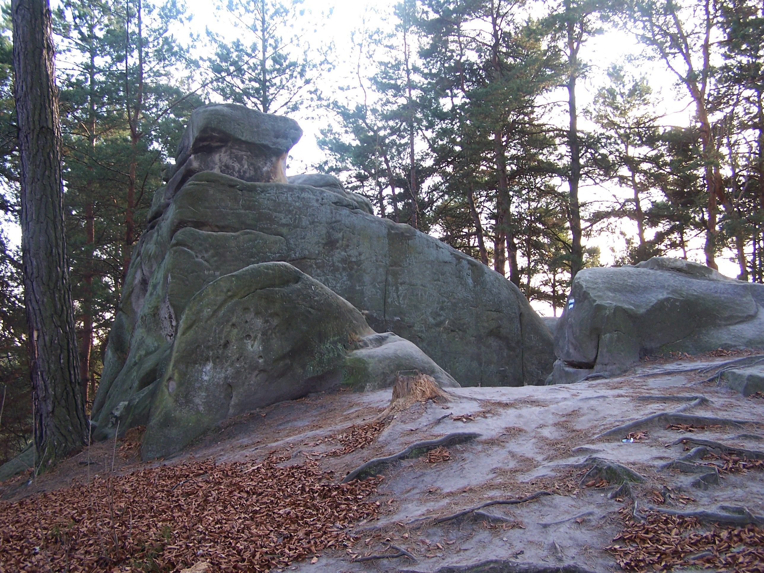 Skała Borsuk w rezerwacie przyrody Skamieniałe Miasto w Ciężkowicach